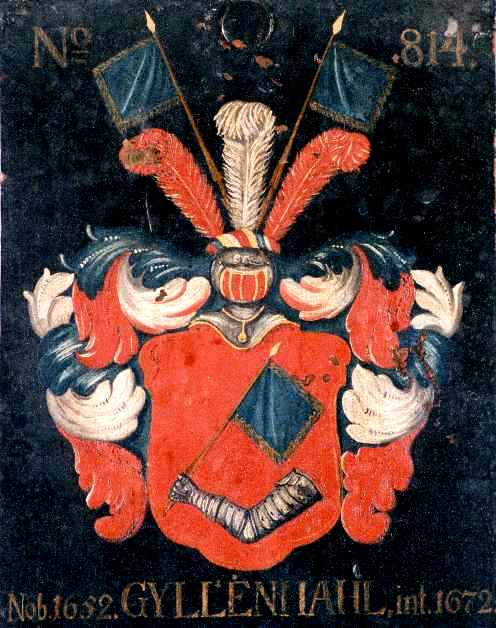 Wapenschild van het geslacht gyllenhaal.